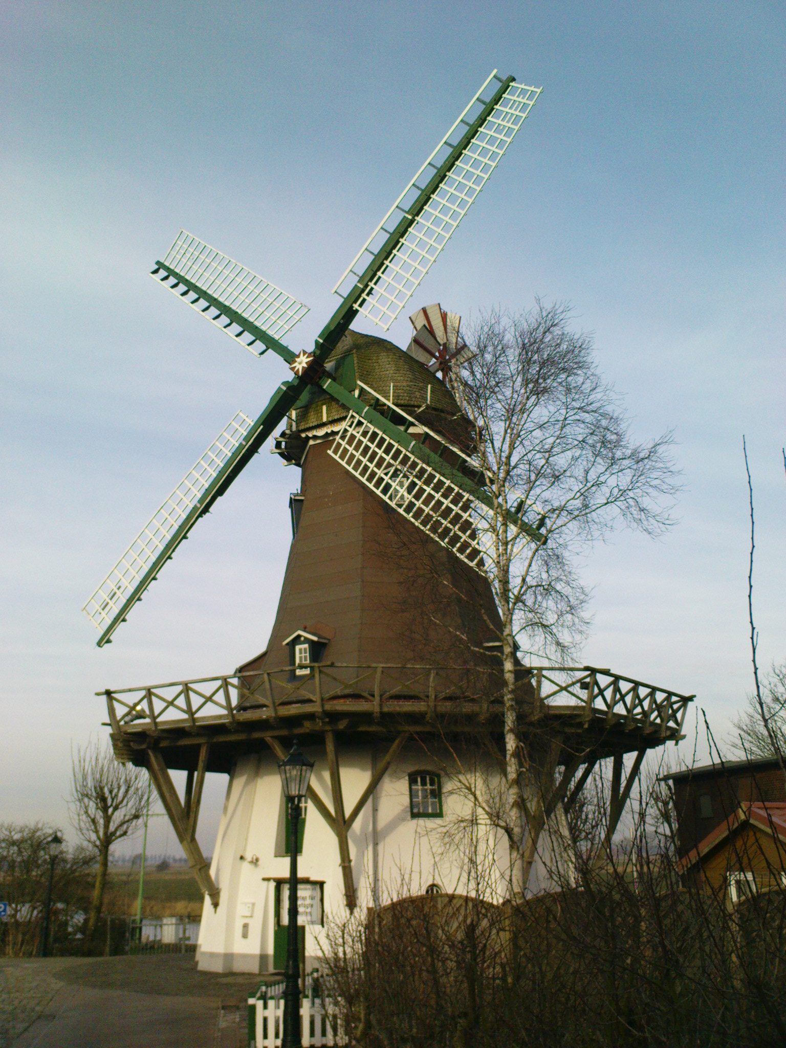 Dies ist die Kost-Winning-Mühle im Emder Stadtteil Larrelt.